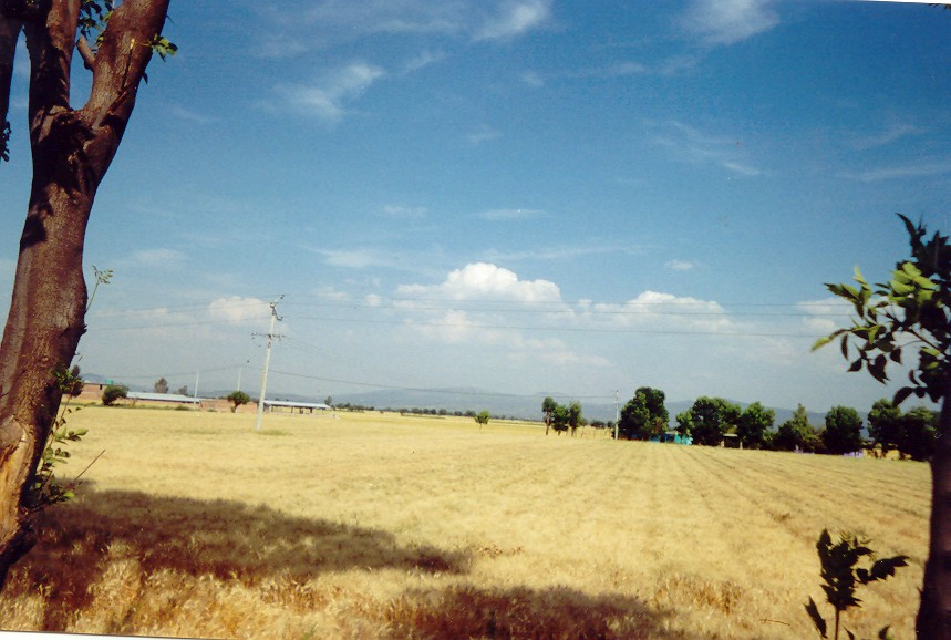 foto de los campos de trigo alrededor de Pastor Ortiz